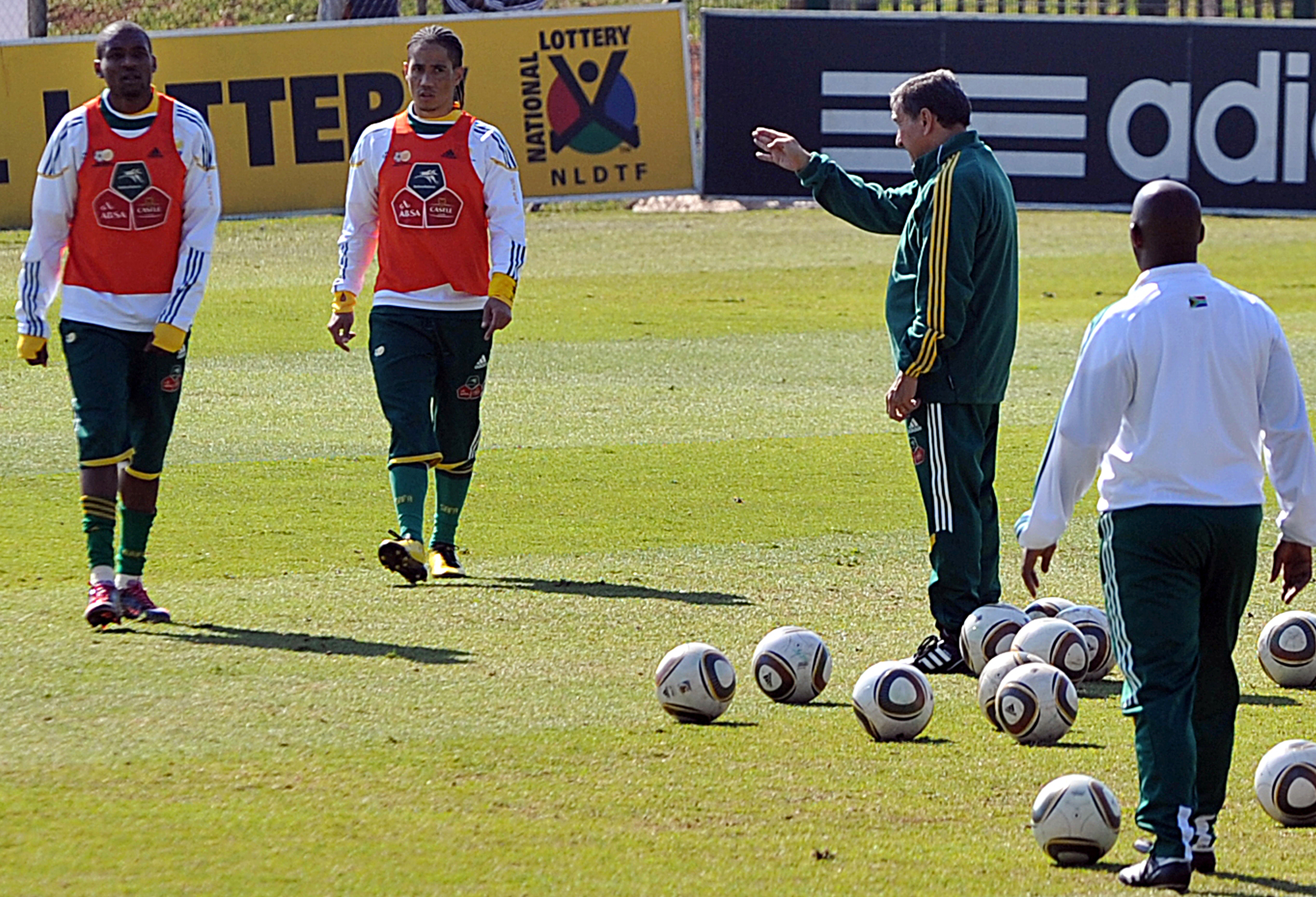 Johannesburgo (África do Sul) - A seleção dos Bafana Bafana treina no campo da Universidade de Witwatersand, observada pela imprensa internacional.